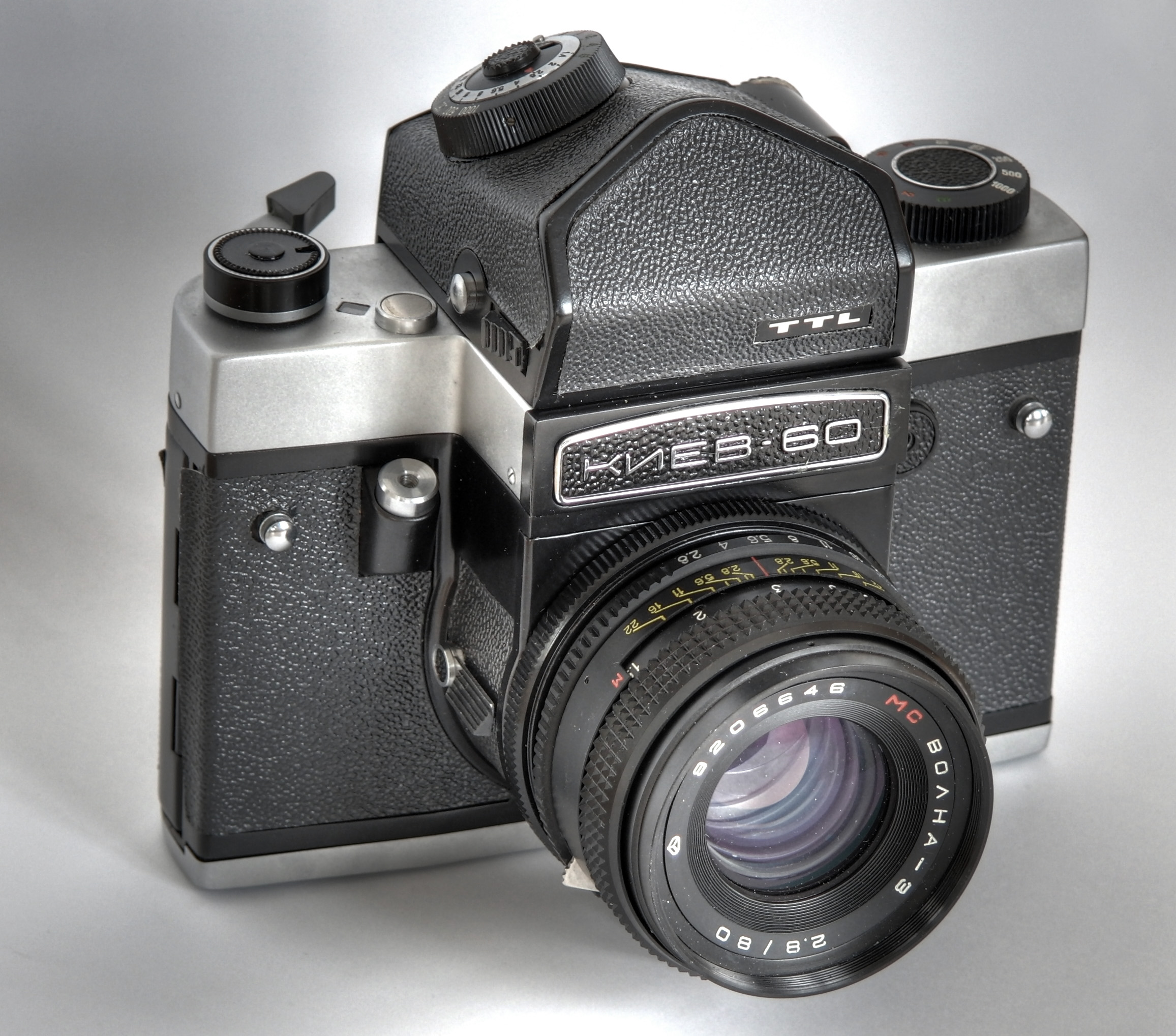 Kiev 60 6x6 camera